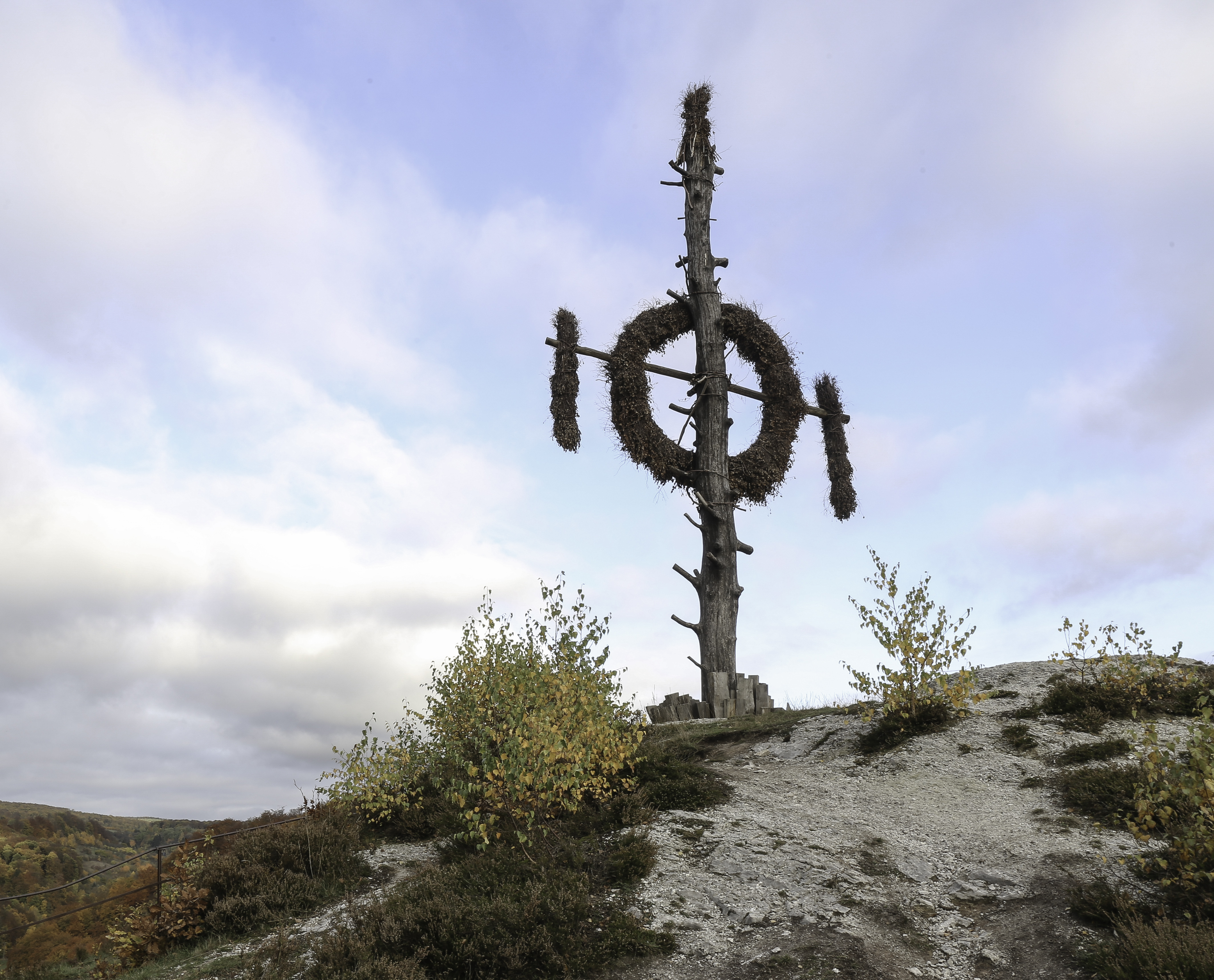 Die Queste von 2016 in Questenberg